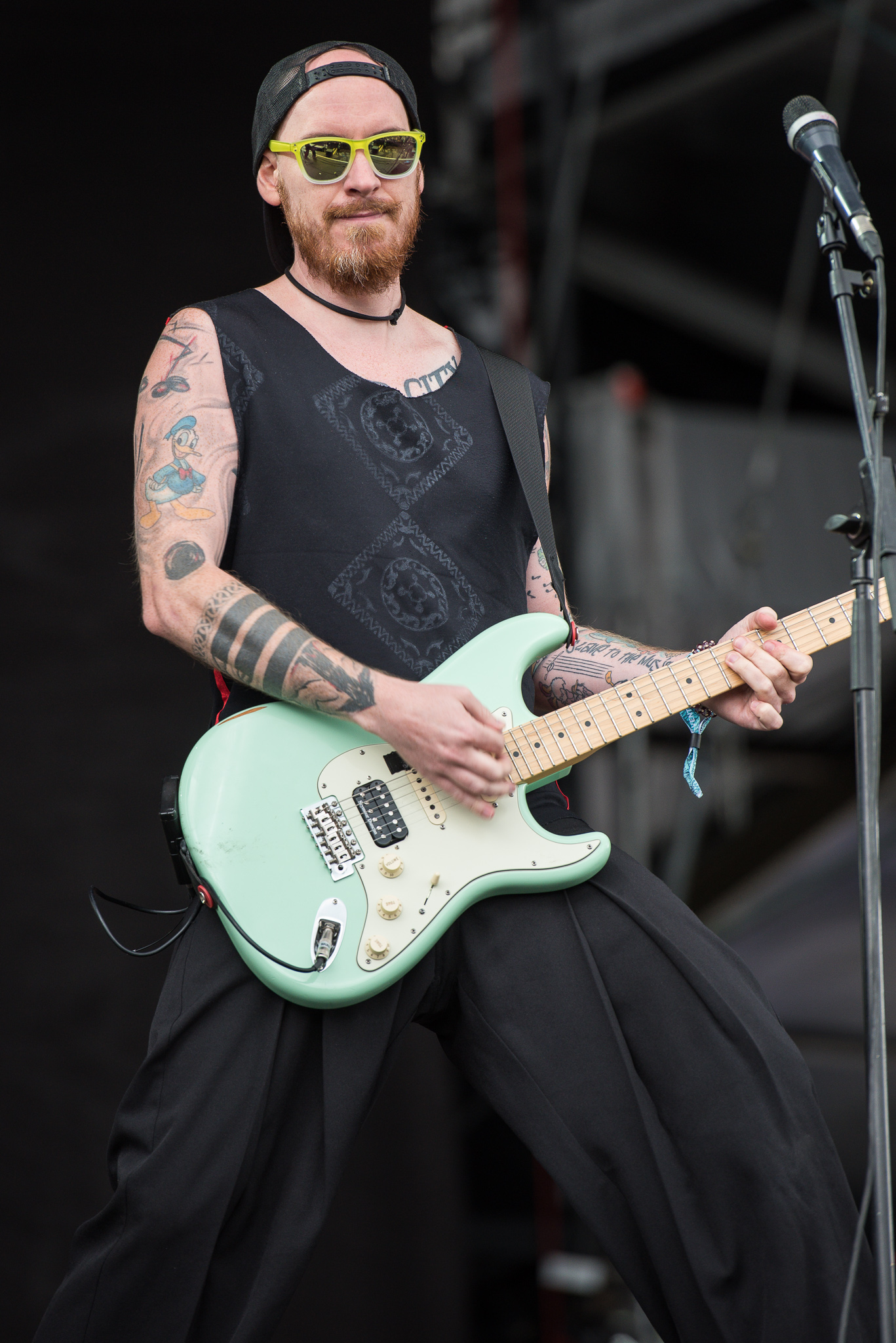 Deichbrand,ESK Events & Promotion GmbH,Engel Mayr,Festival,Fire Stage,Konzert,Livekonzert,Livemusik,Russkaja,Sea-Airport Cuxhaven/Nordholz,See-Flughafen Cuxhaven/Nordholz,Seeflughafen Cuxhaven/Nordholz